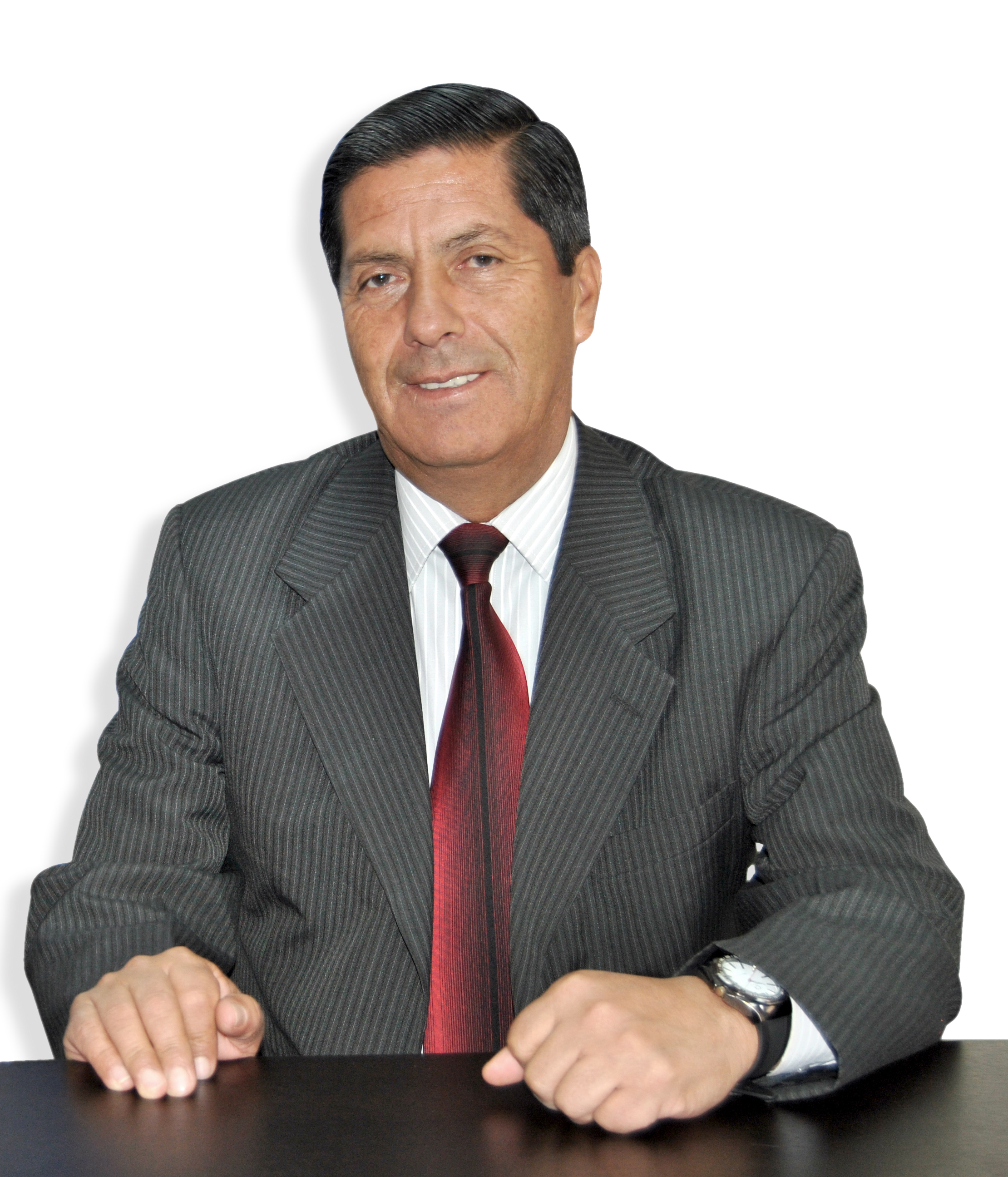 Prefecto de la provincia de Imbabura Administración 2014 - 2019